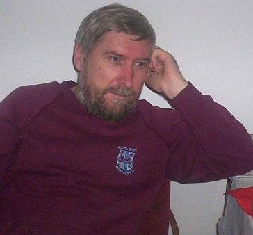 Roman Musztyński [1]